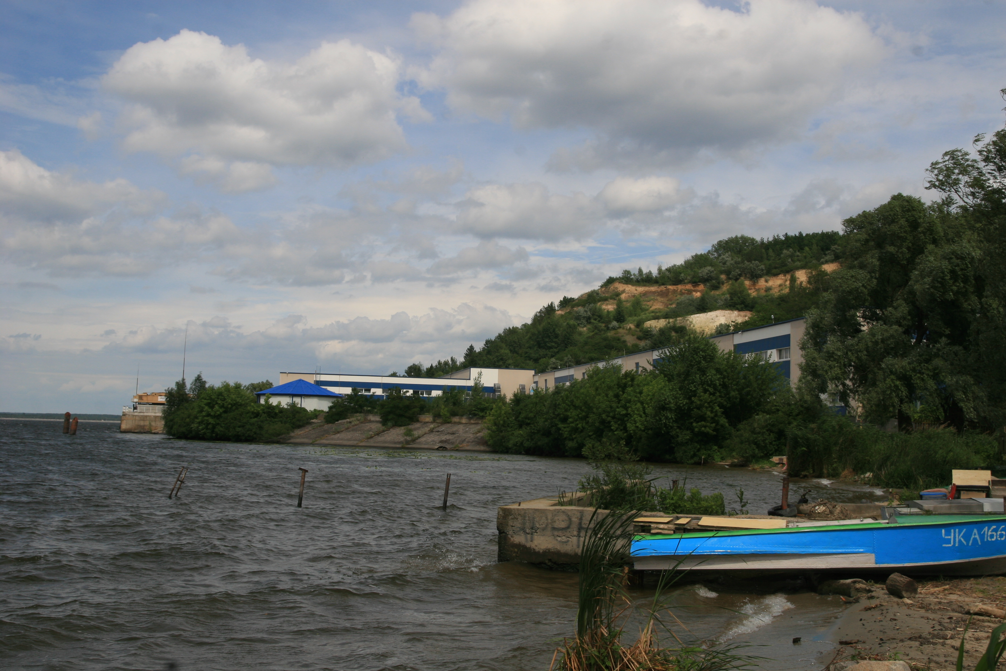 Причал та вигляд на Дніпро в селі Халеп'я Обухівського району Київської області, Україна